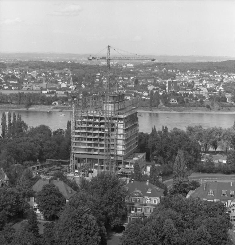 Übersichtsaufnahmen von Bonn und Bad Godesberg vom neuen Hochhaus im Tulpenfeld aus Information added by Wikimedia users.